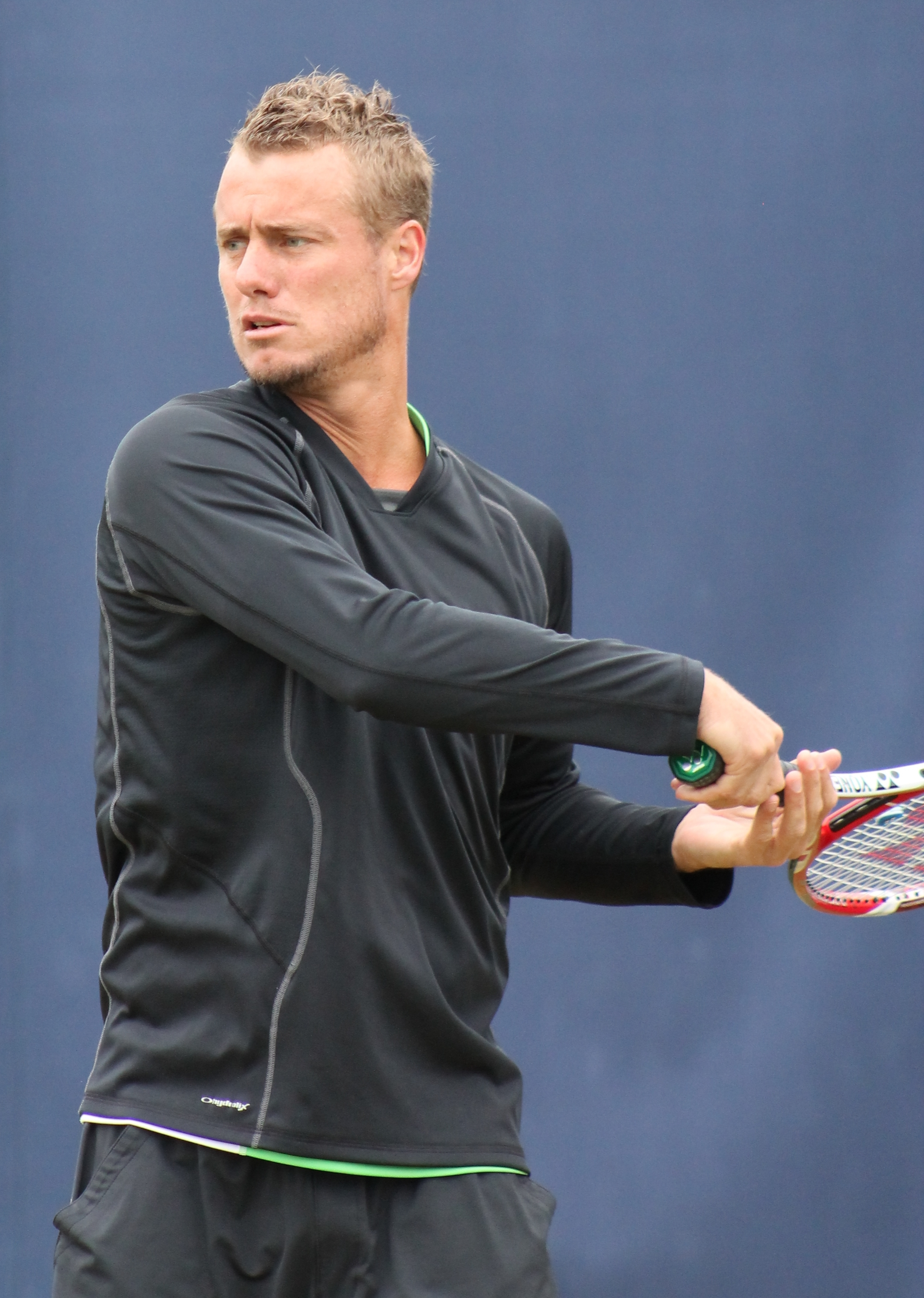 Hewitt QC13-018